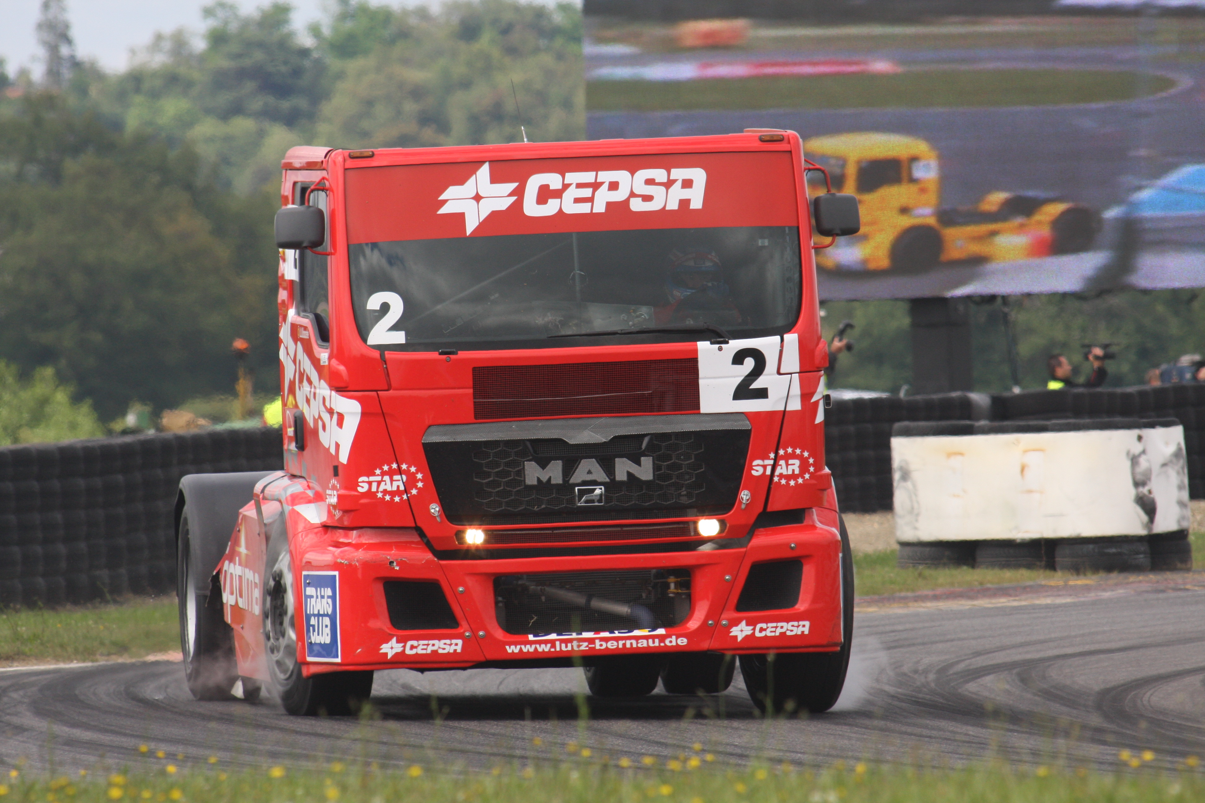 GP camions Nogaro 2010